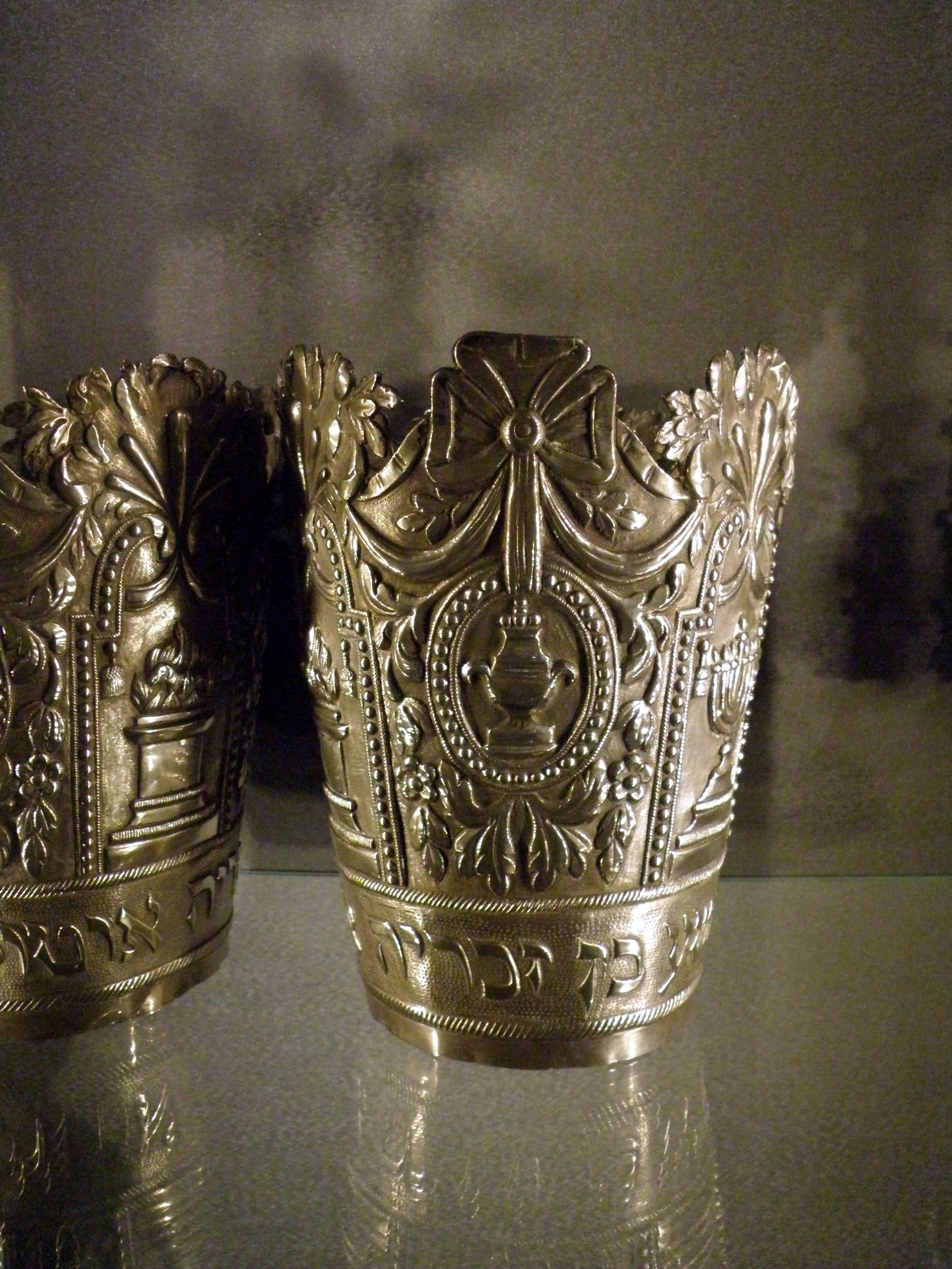 בתים מבפנים 2010